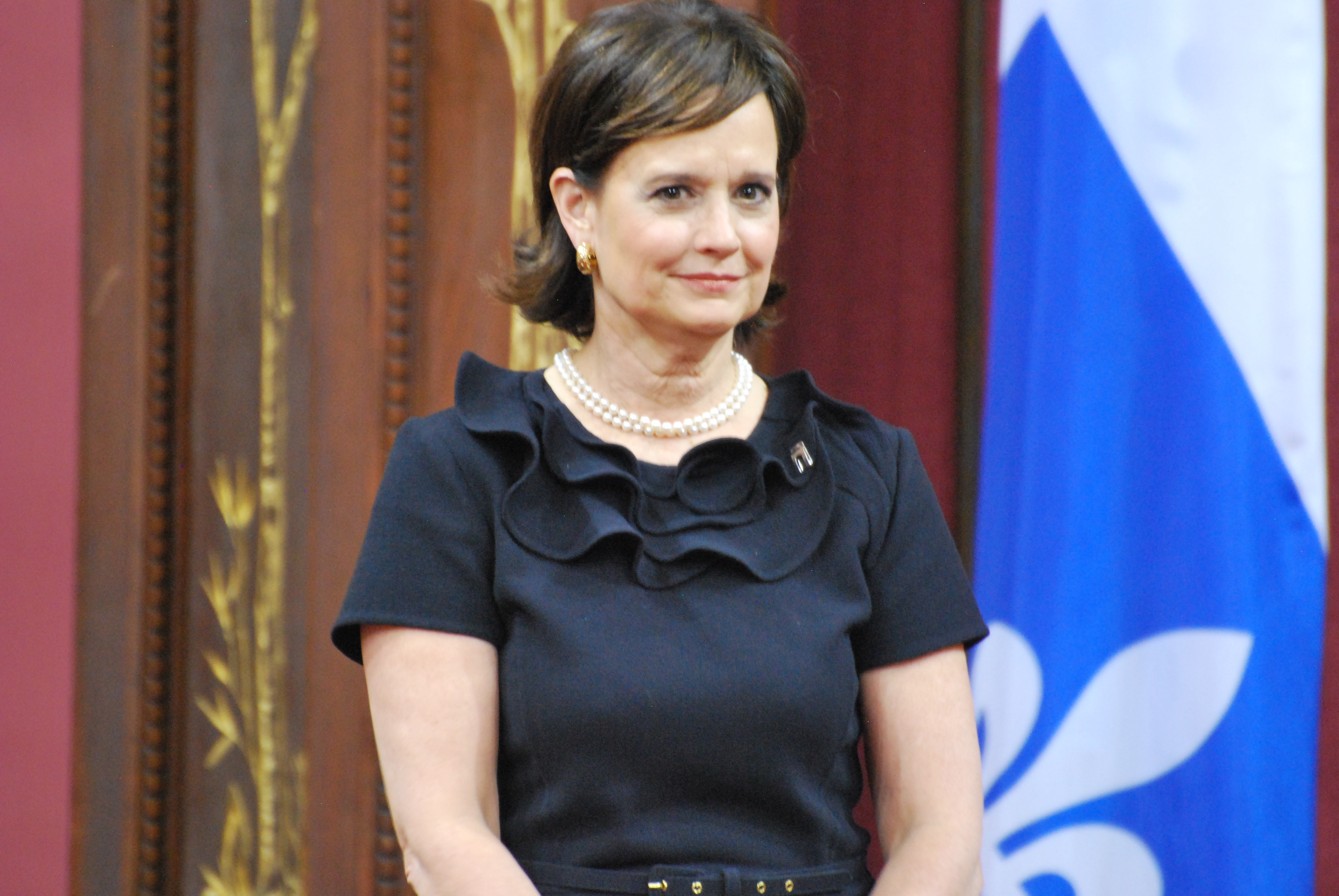 Cérémonie de remise de l'ordre national du Québec 2013.